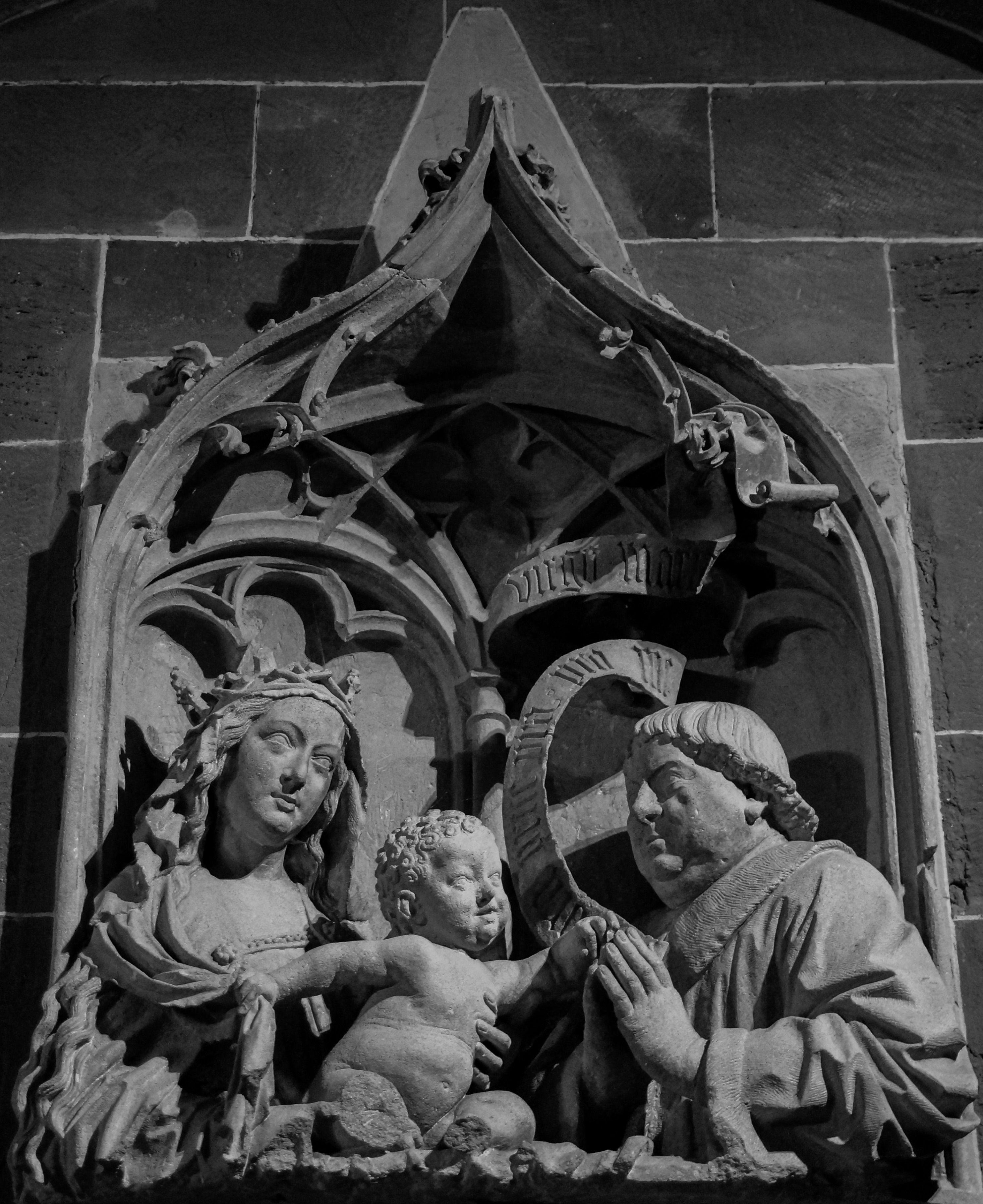 Epitaphe du Chanoine Von Busnang, chapelle Saint Jean-Baptiste, Cathédrale de Strasbourg